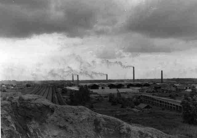 Rumst Steenberghoekstraat zonder nummer